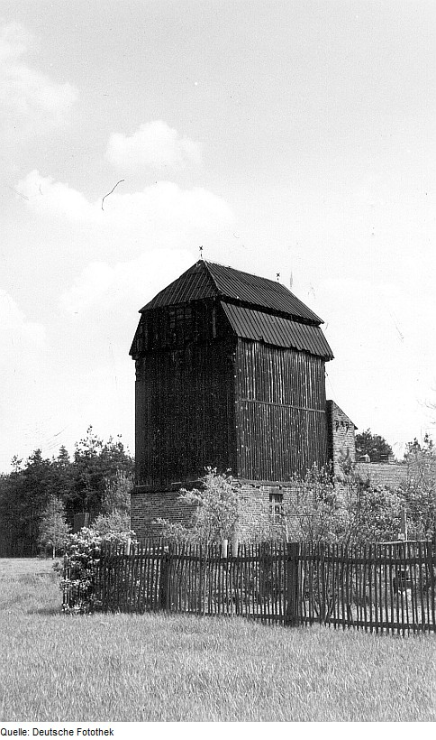 Original image description from the Deutsche Fotothek Schlieben-Oelsig. Ehem. Bockmühle?